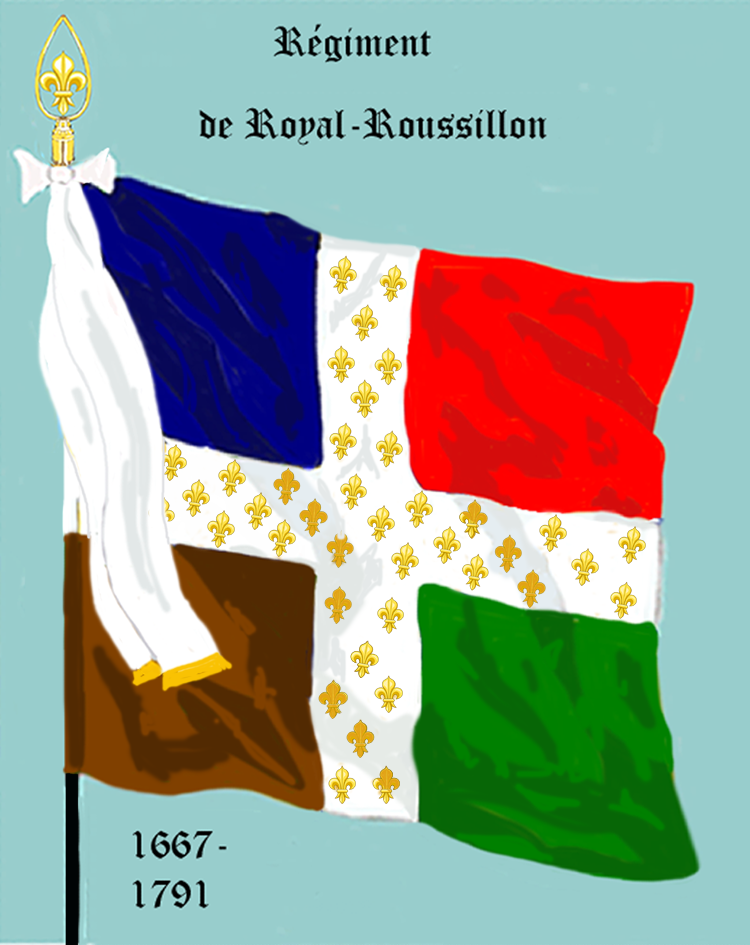 Ordonnanzfahne eines königlich französischen Infanterie-Regiments. - Entnommen und überarbeitet aus: „LES UNIFORMES ET LES DRAPEAUX DE L'ARMÉE DU ROI“ Marseille 1899. (Drapeau d'Ordonnance d' un régiment française d'infanterie royale.)